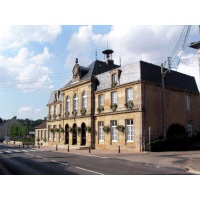 Mairie de Chalindrey. (Haute-Marne, Champagne-Ardenne).